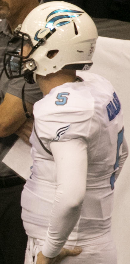 Valor 47 / Philadelphia Soul 48